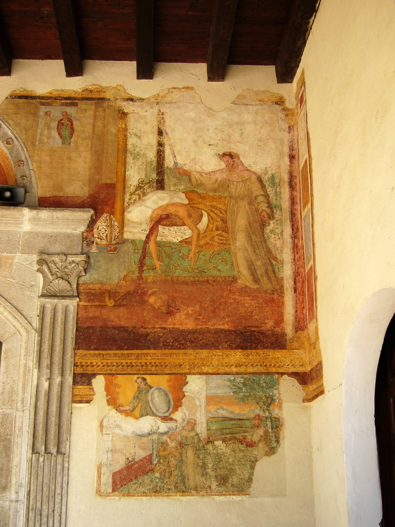 Fresque du porche de l'église du convento di Sant'Antonio à Rivello (Basilicate).